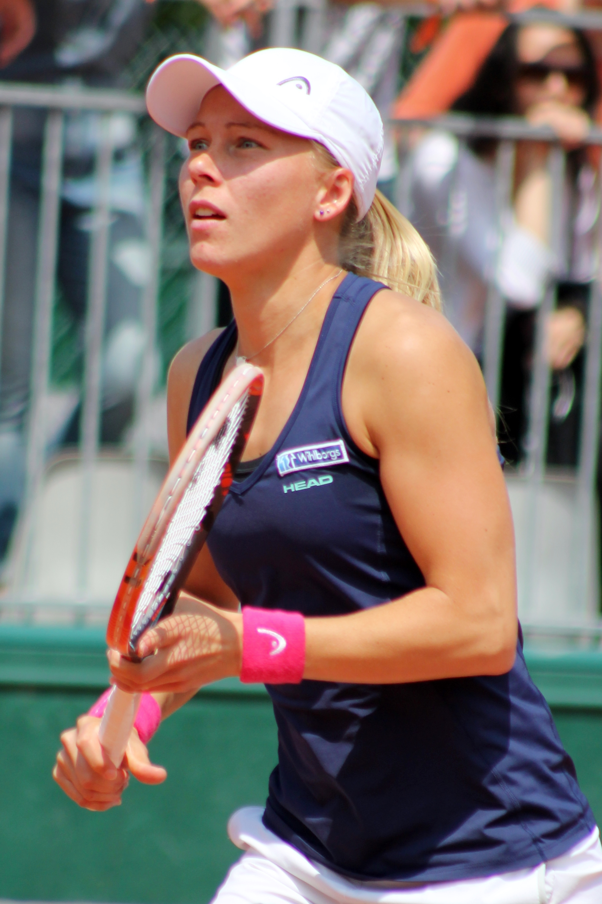 Larsson RG16 (9)